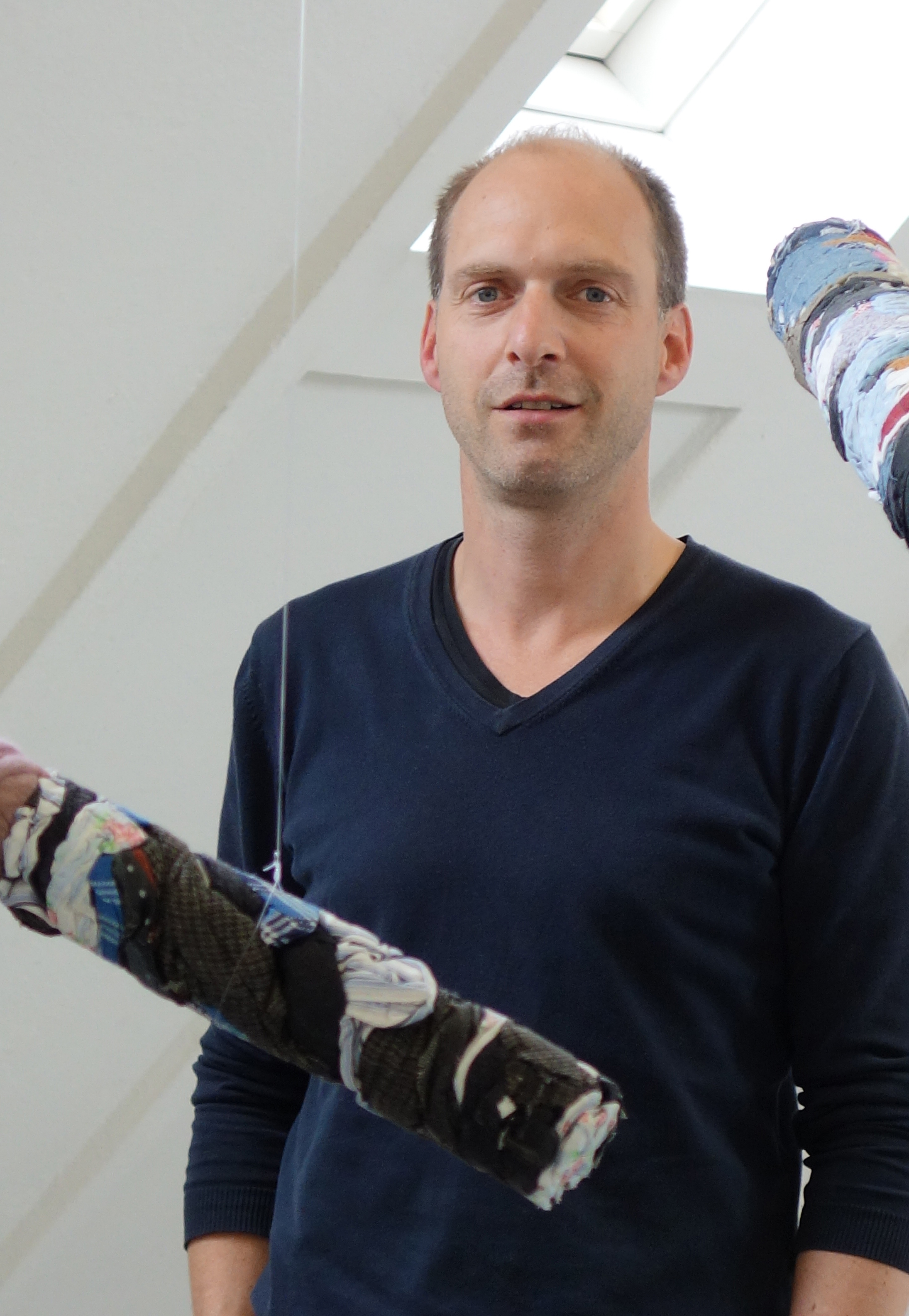 Porträt von Ingo Clauß